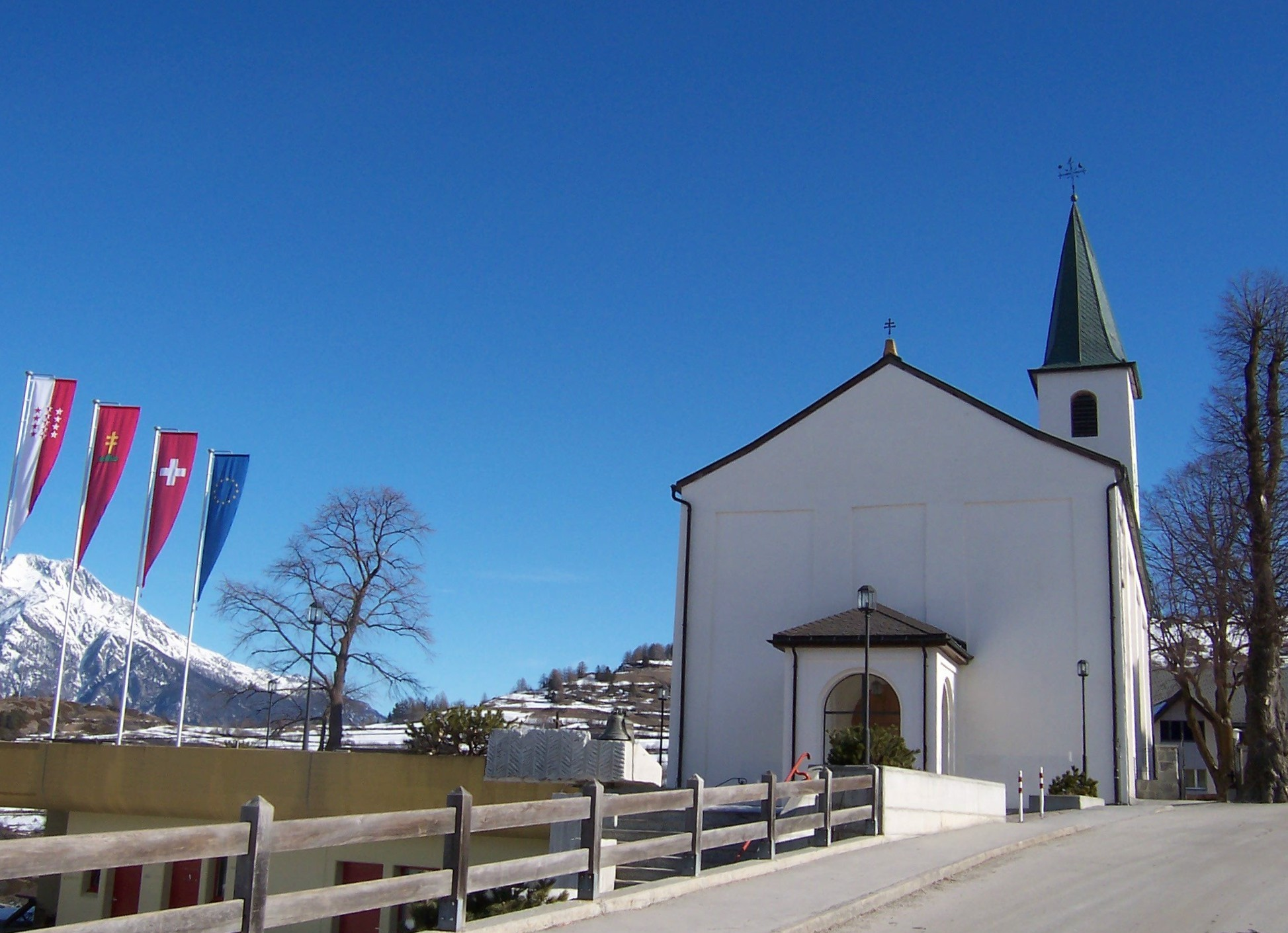 Unterbächer Pfarrkirche aus dem Kirchplatz gesehen. Fahnen von links: Kanton Wallis, Gemeinde Unterbäch, Schweiz, EU. Der Berg auf linker Seite ist der Gärsthorn (2927 m.ü.M.)